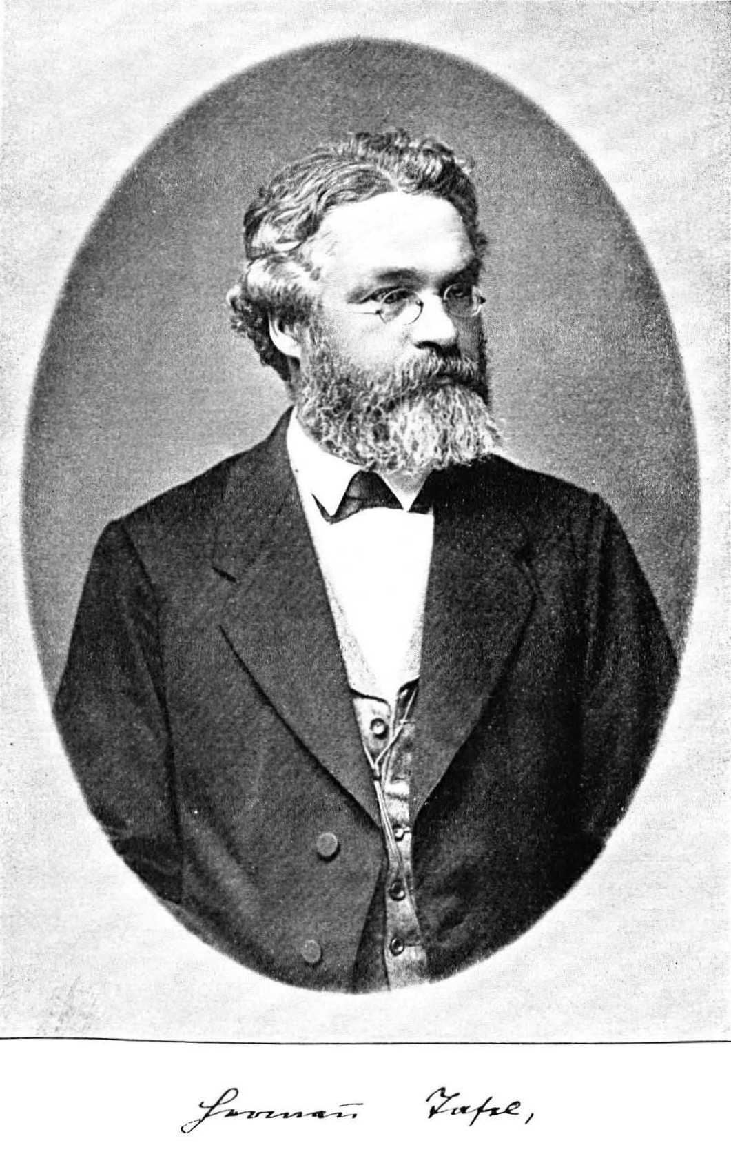 Hermann Tafel, Porträt.